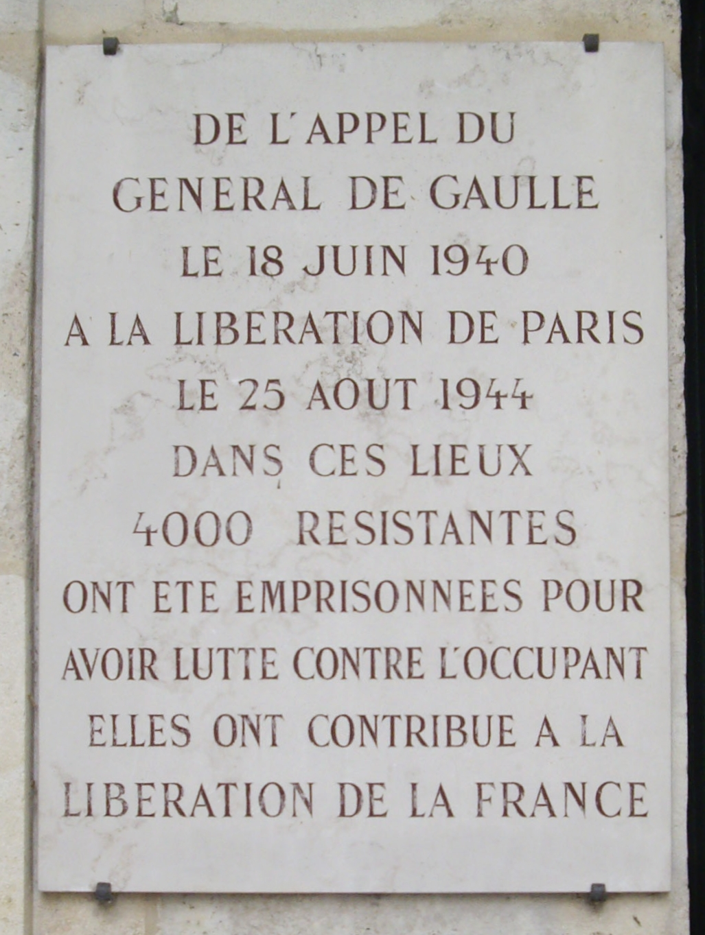 Plaque commémorative à l'entrée du square de la Roquette, sur l'une des guérites d'accès de l'ancienne prison de la Roquette, 168 rue de la Roquette, Paris 11e.« De l'appel du général de Gaulle, le 18 juin 1940, à la libération de Paris, le 25 août 1944, dans ces lieux 4000 résistantes ont été emprisonnées pour avoir lutté contre l'occupant. Elles ont contribué à la libérationde la France. »